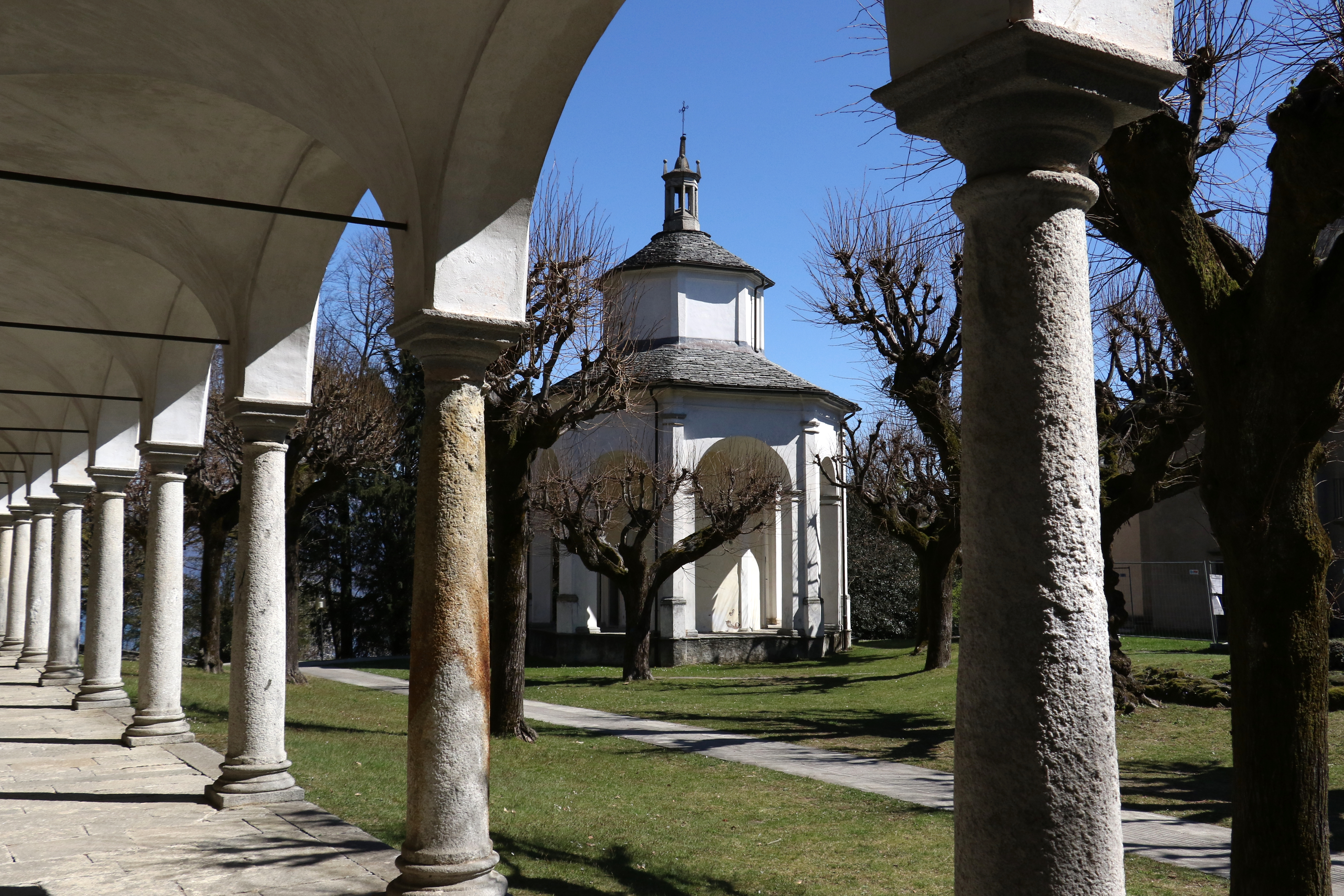 Sacro Monte di Ghiffa